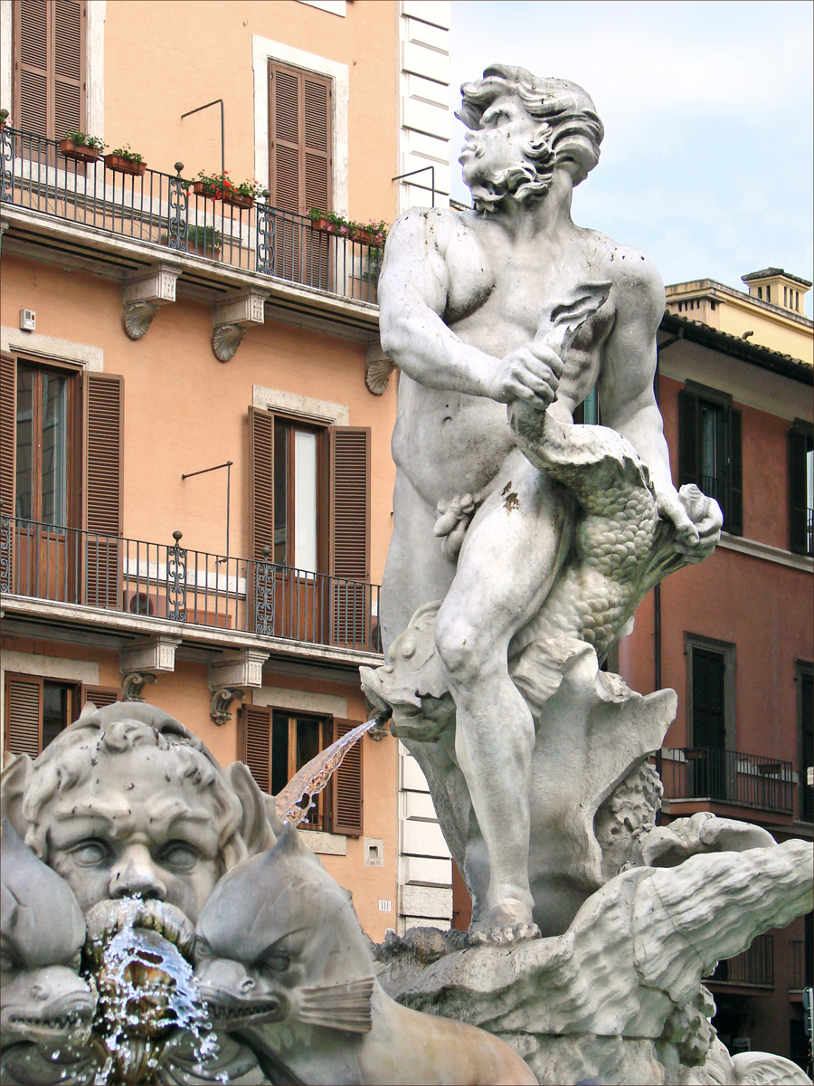 L'éthiopien de la fontaine du Maure (Fontana del Moro) Dessinée par Bernin, cette fontaine représente un éthiopien luttant avec un dauphin. les masques et les tritons qui entourent le groupe central sont de Giacomo della Porta (1576)